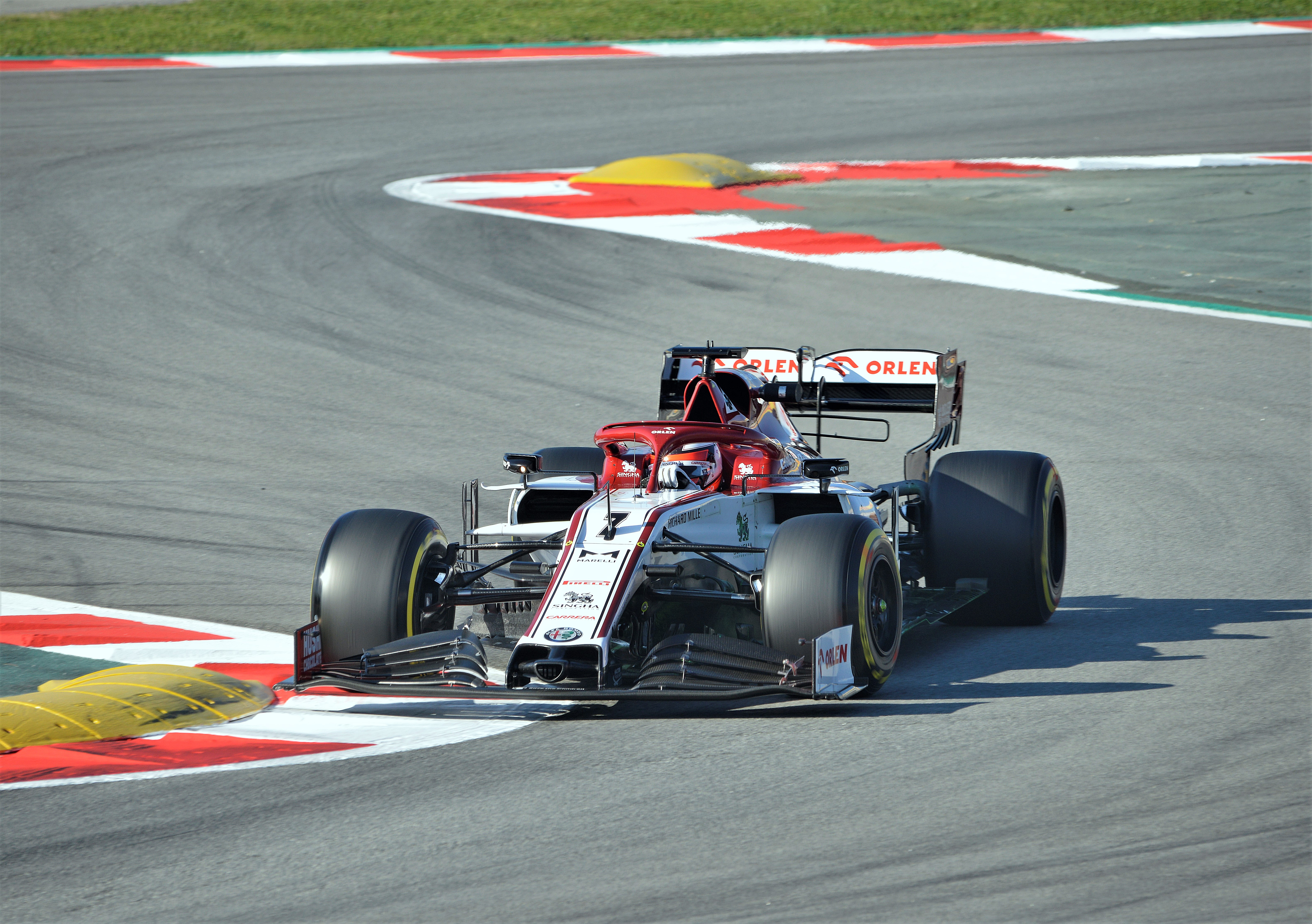 Tets Days F1 2020